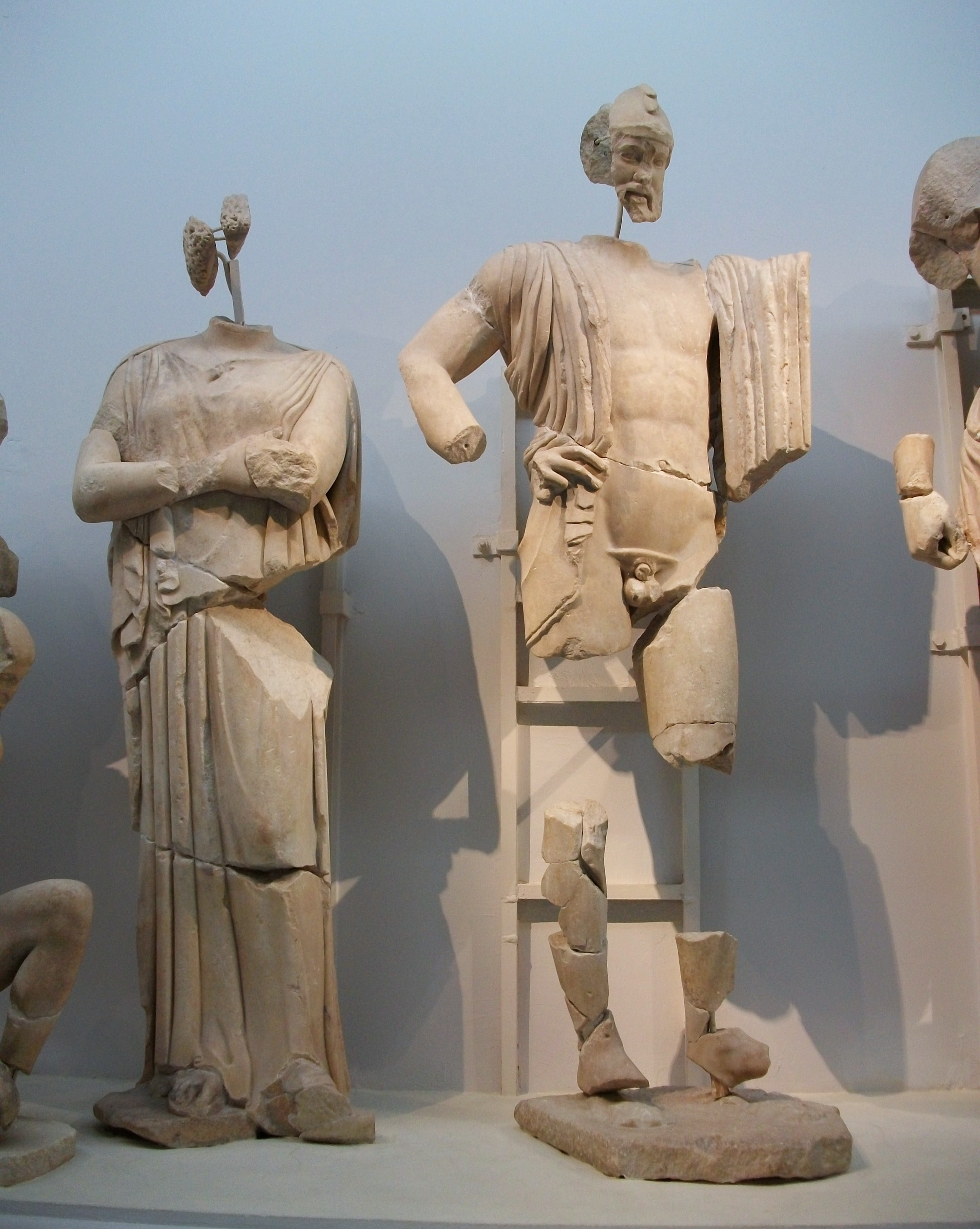 Asteròpe i Enomau, frontó oriental del templde de Zeus, Museu arqueològic d'Olímpia.